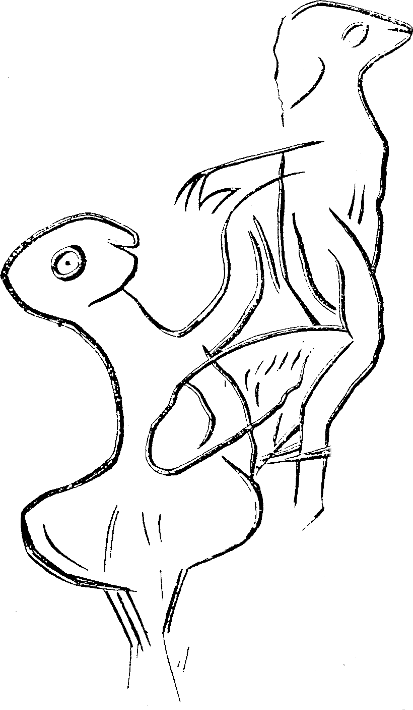 Hierogamia grabada en la Cueva de los Casares (Guadalajara, España), la escena completa incluye un mamut y varios antropomorfos.